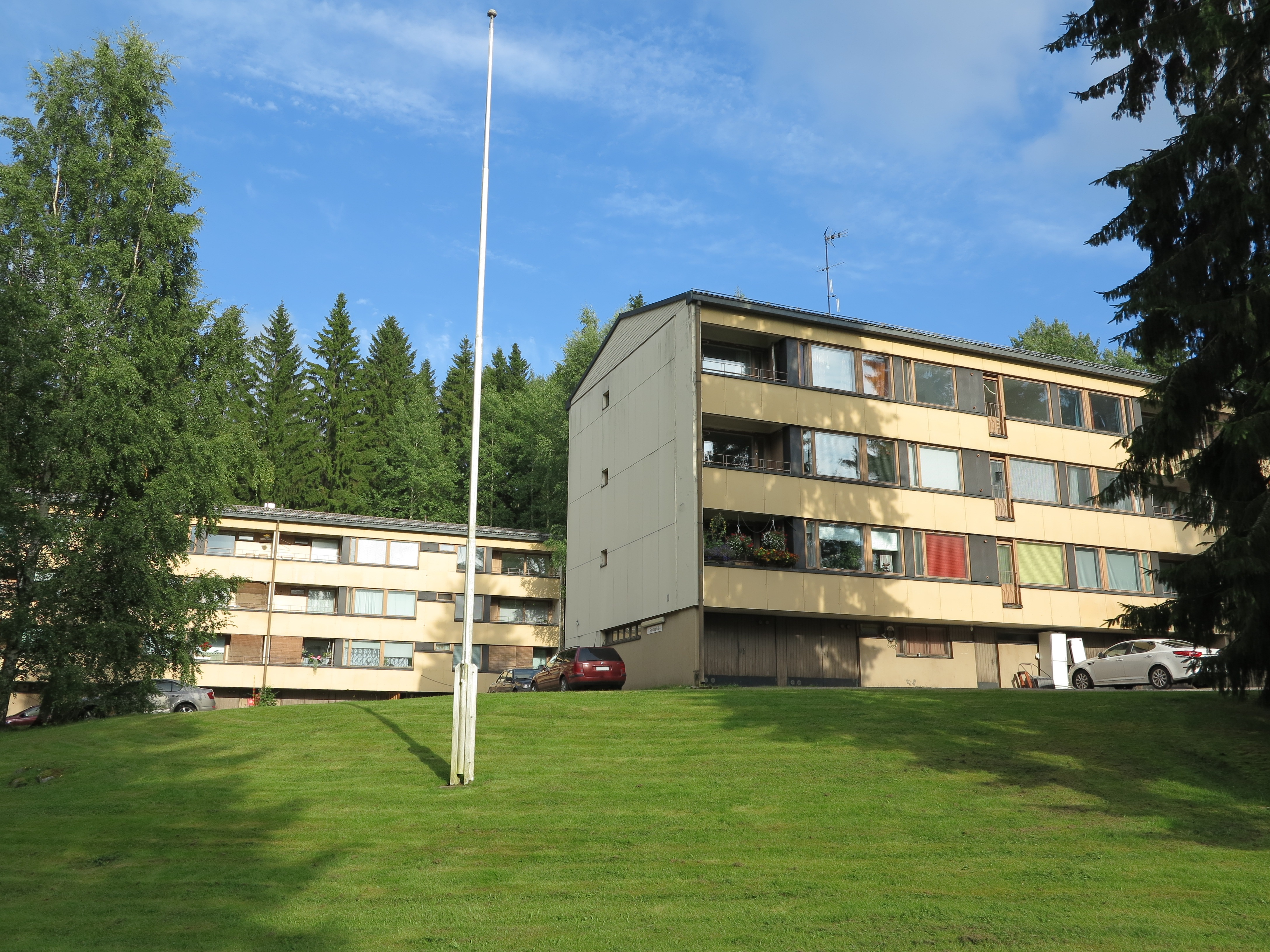 Kerrostaloja Rautsalossa